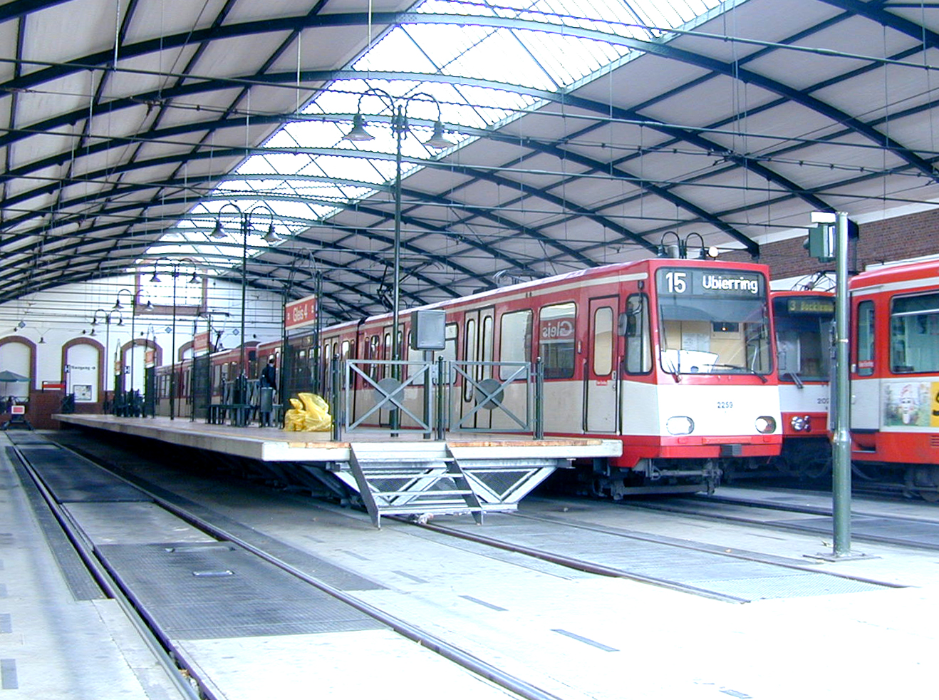 Stadtbahn Köln, Tramhalte in ex Depot Thielenbruch op 16 november 2000